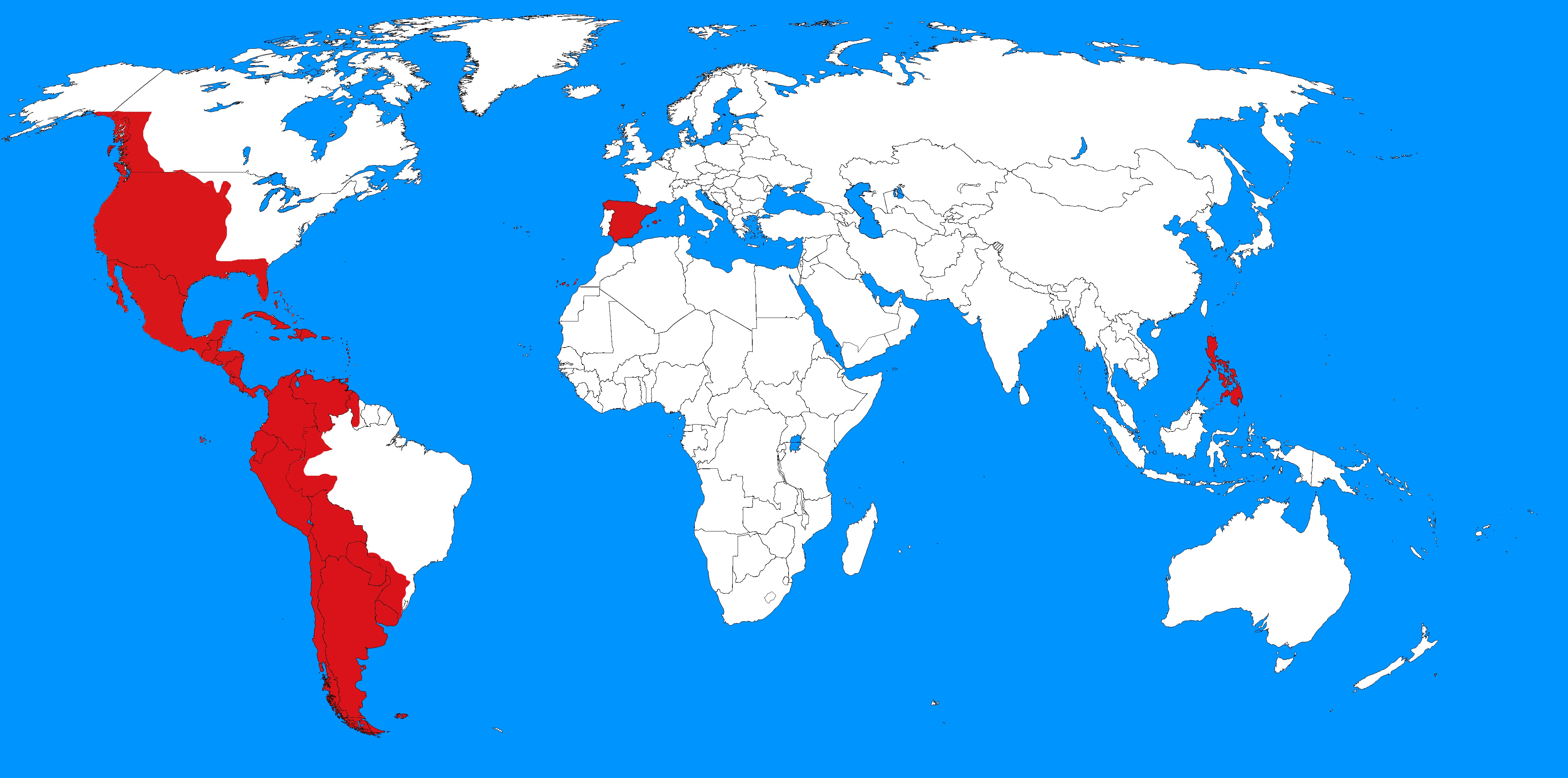 imperio español